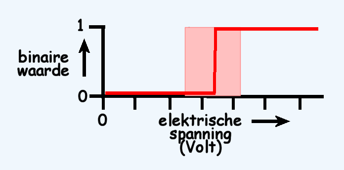 bitwaarde als functie van analoge spanning